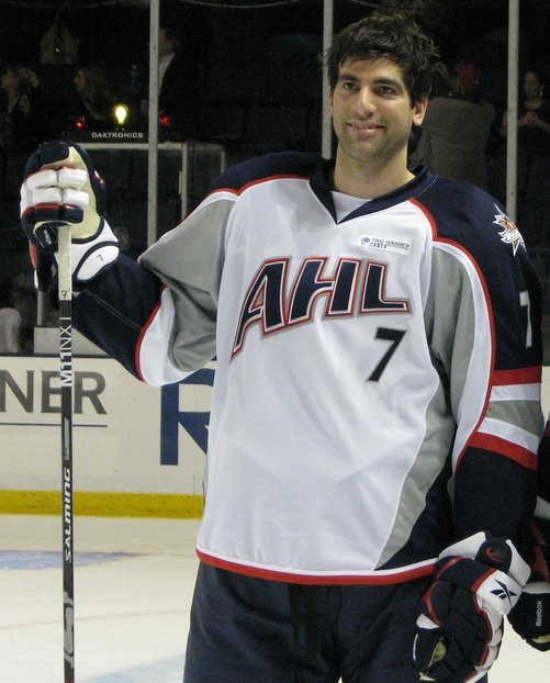 Andy Wozniewski at the 2010 AHL All-Star Game